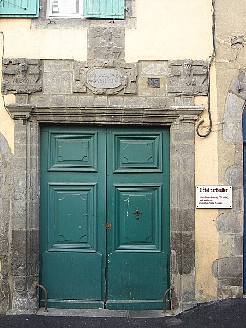 Porte de l’hôtel du Président-Maynard à Aurillac